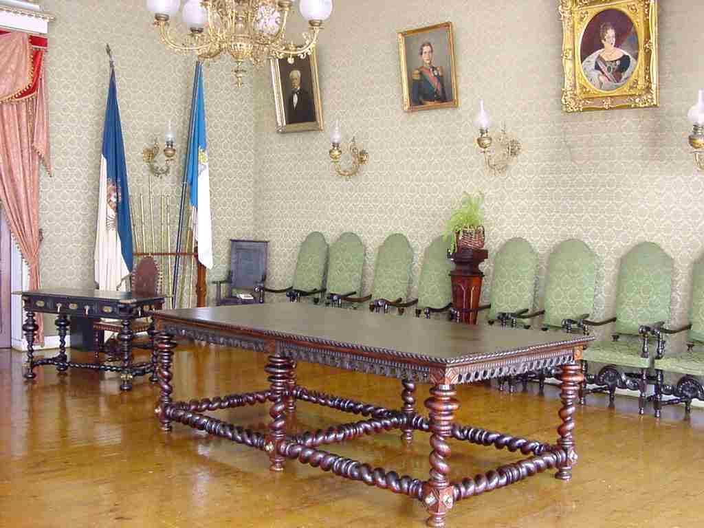 Câmara Municipal de Angra do Heroísmo, Salão Nobre, Angra do Heroísmo, ilha Terceira, Açores, Portugal.